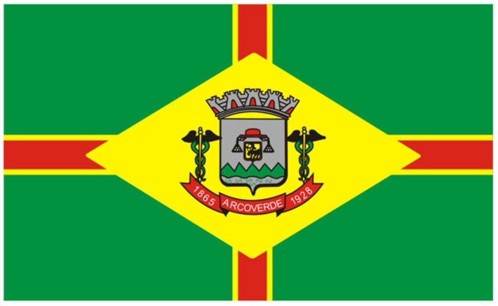 Bandeira_de_Arcoverde